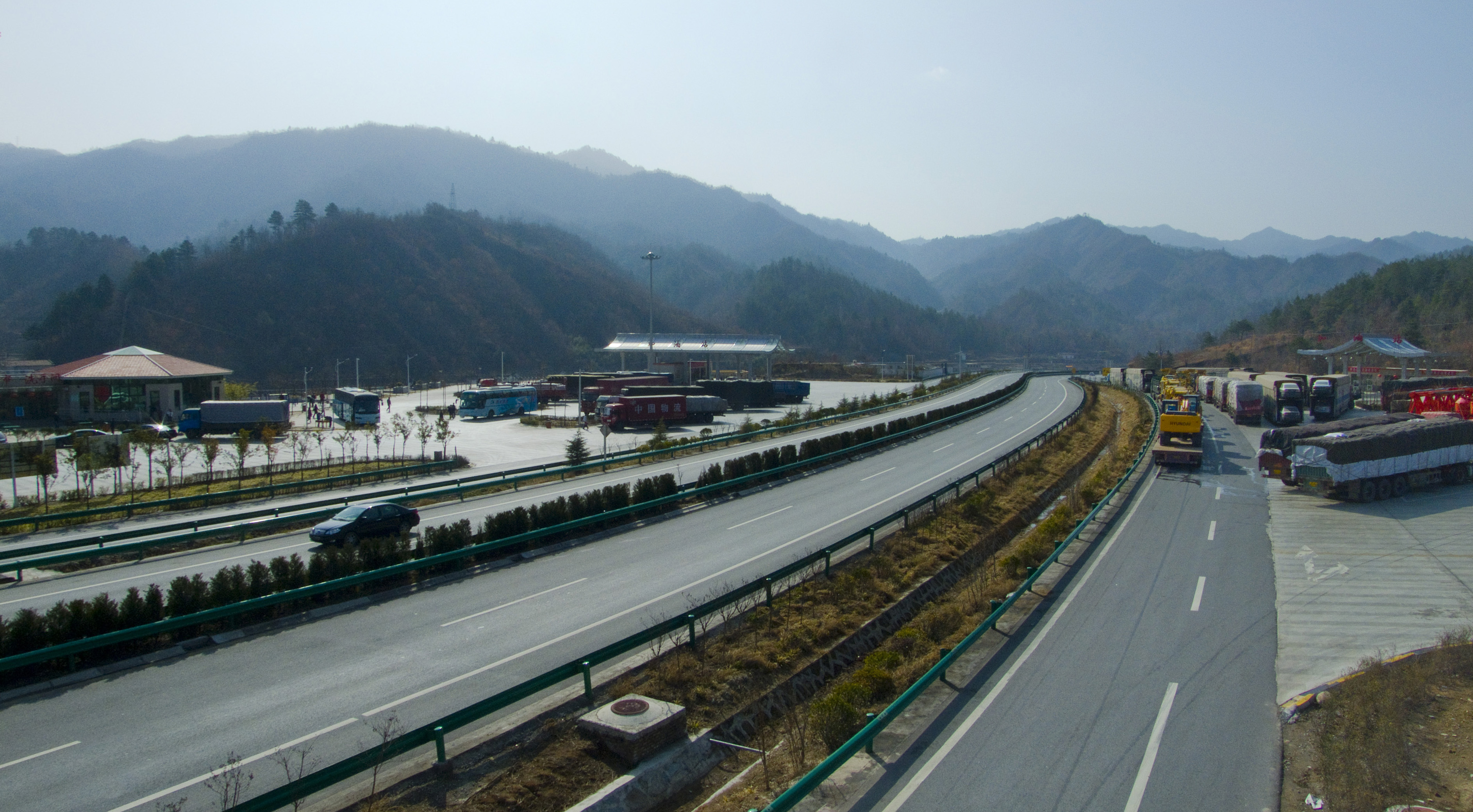 中文（中国大陆）: 宁陕休息区俯拍西汉高速公路